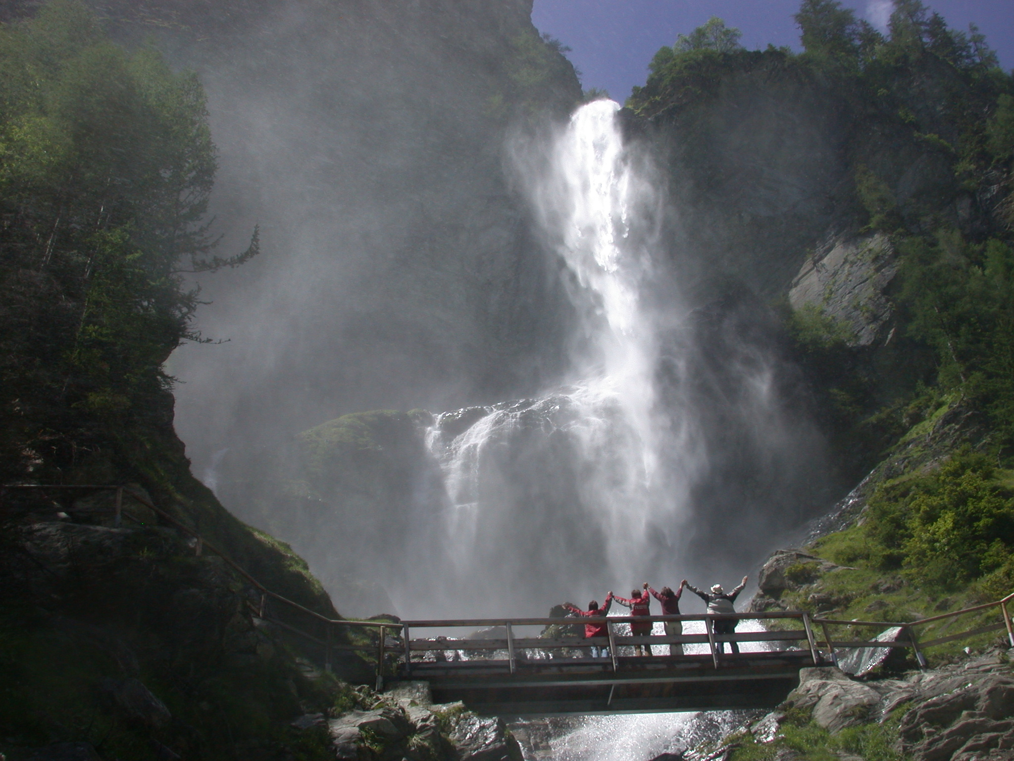 Der Jungfernsprung im Mölltal (Nationalpark Hohe Tauern) mit einem für jedermann begehbaren Kurzerlebnisweg ist einen Besuch wert. This media shows the natural monument in Carinthia with the ID Sp 25.